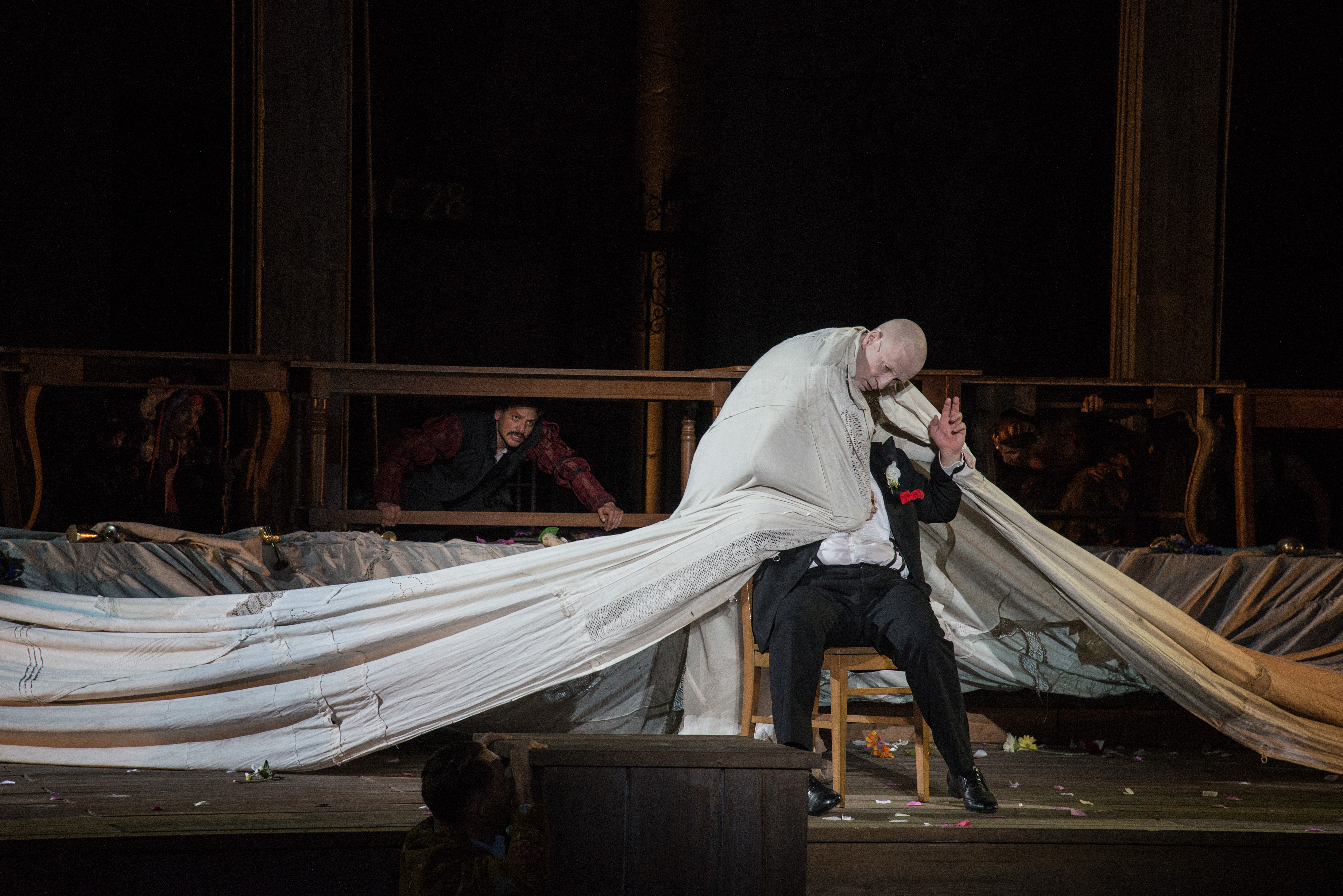 Jedermann, Salzburger Festspiele 2014, Jedermann und der Tod. Mit Peter Lohmeyer (Tod) und verdeckt Cornelius Obonya (Jedermann). Im Hintergrund unter dem Tisch Jesse J. Perez (Tischgesellschaft), der auch die Choreographie verantwortete. Regie: Julian Crouch und Brian Mertes.